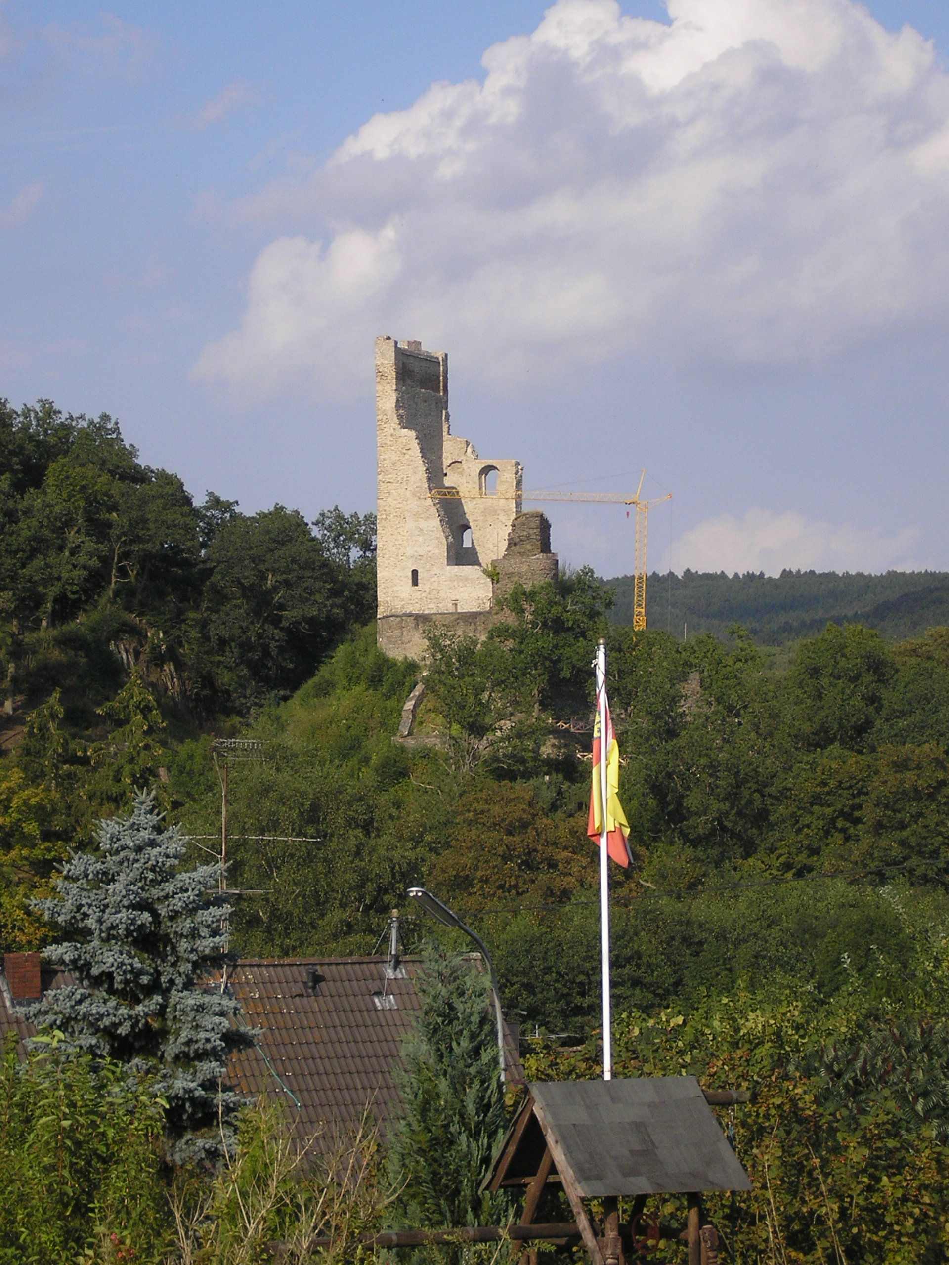 Burgruine Reichenstein, Blick von Puderbach-Reichenstein